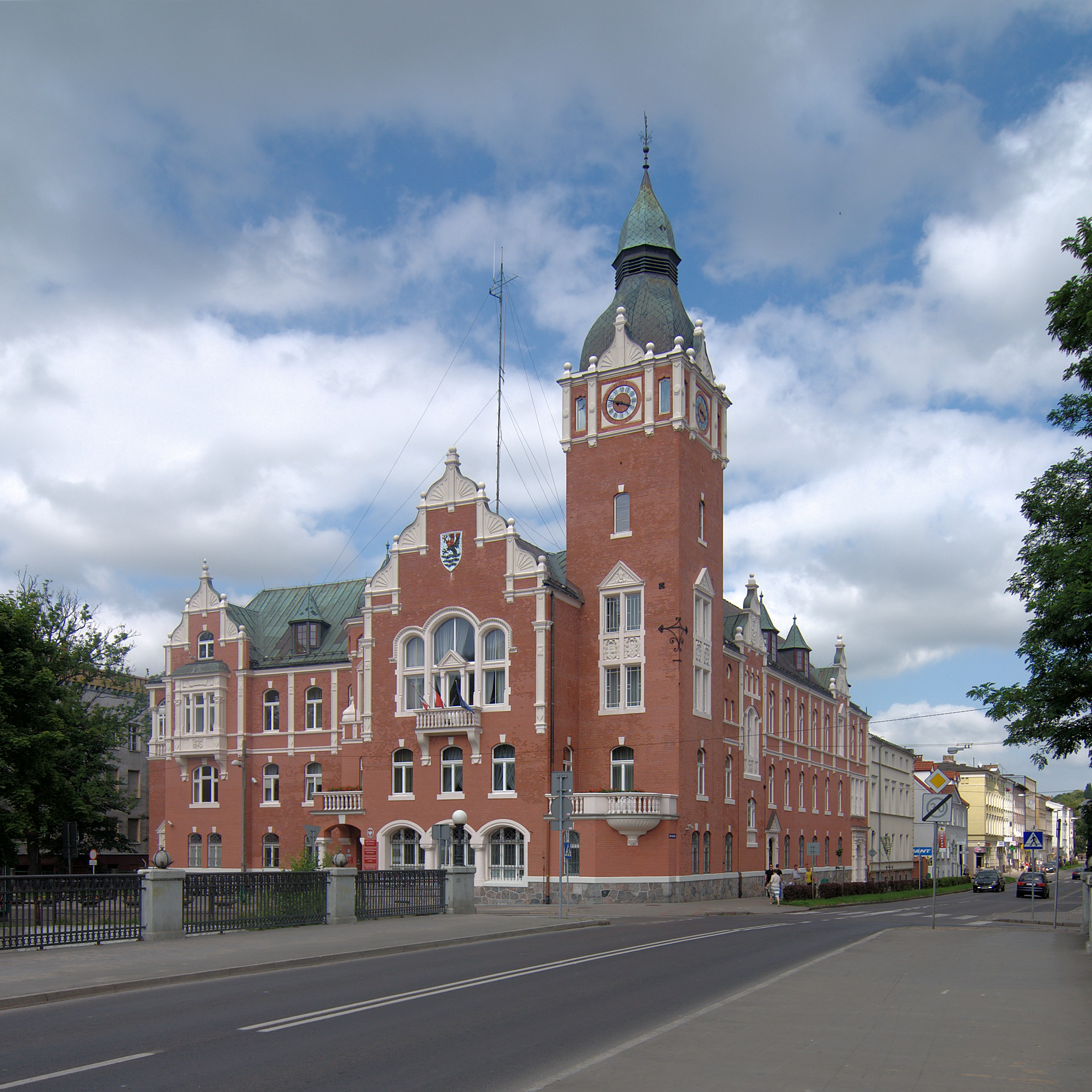 Słupsk. Ulica Szarych Szeregów. Starostwo Powiatowe.